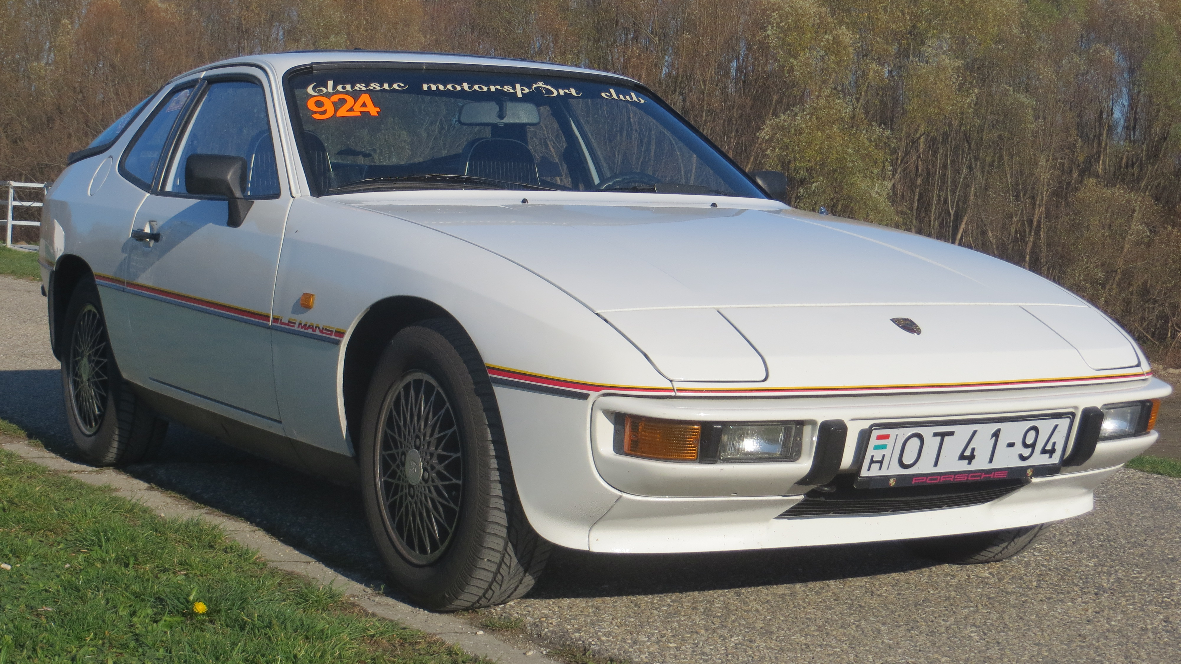 Ez a különleges modell a Porsche Le Mans-i 24 órás autóversenyeken elért hatalmas sikerei előtti tisztelgés. Összesen 1002 darab (más források szerint 1030) épült a modellből, mindegyik alpesifehér színben, körbefutó sárga-fekete-vörös díszítő csíkkal, az első sárvédőkön ugyanilyen színű Le Mans felirattal. A modellen a 924 Turbo hátsó spoilere van, 6J×15-ATS Turbo-Look keréktárcsák, belül csíkos „Nadelstreifen” kárpitozású Turbo ülések fehér szegéllyel, 36 cm átmérőjű négyküllős bőrkormány, bőr váltógomb, az ajtóküszöbön fekete alapon fehér 924 felirat. A gépkocsihoz többféle extrát is lehetett rendelni, elektromos ablakot, elektromosan állítható külső tükröket, hátsó ablaktörlőt, fényszórómosót, légkondicionálót és kivehető targatetőt is. Jobbkormányos kivitelben 100 darab készült.